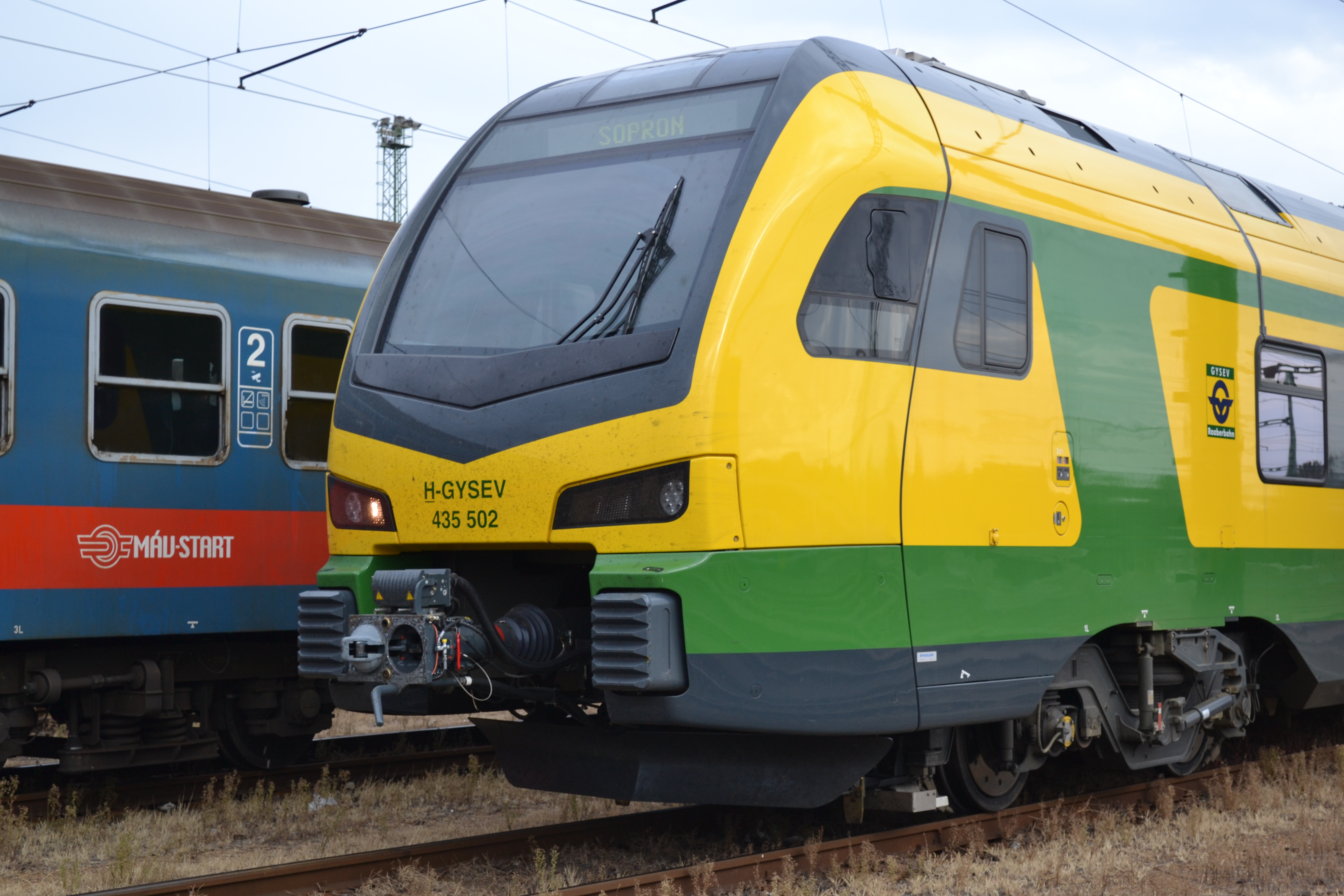 GYSEV FLIRT 3 SZOLNOKON A 20. VÁGÁNYON